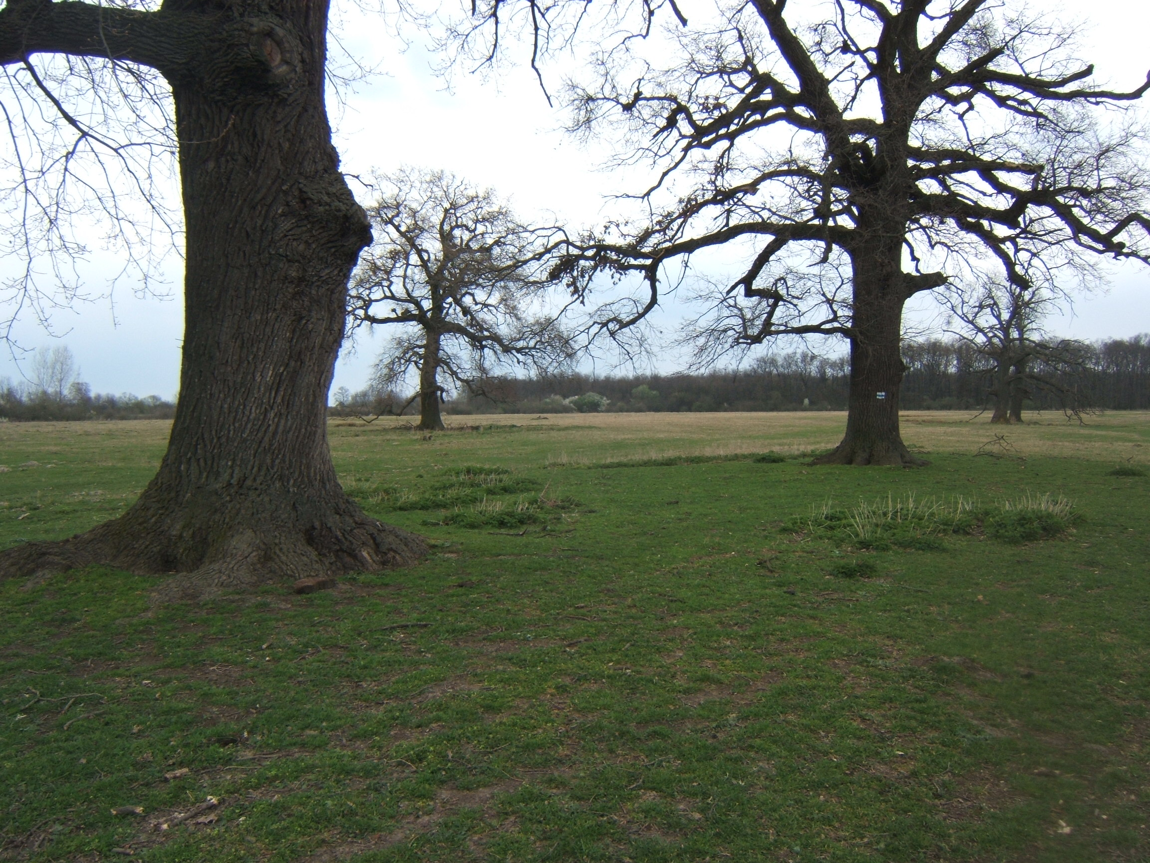 Diósviszlói hagyásfás legelő